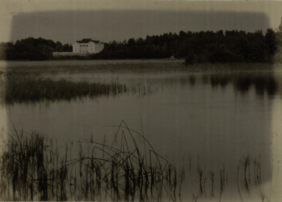 Беларуская (тарашкевіца): Затрочча (Zatročča) з боку возера Троцкага (Trockaje)